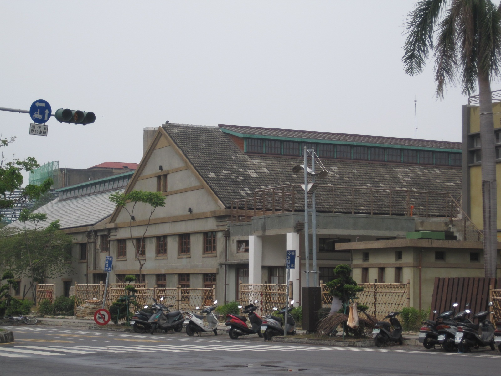 舊嘉義酒廠包裝工廠